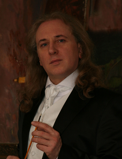 Portrait of Nikolay Anokhin